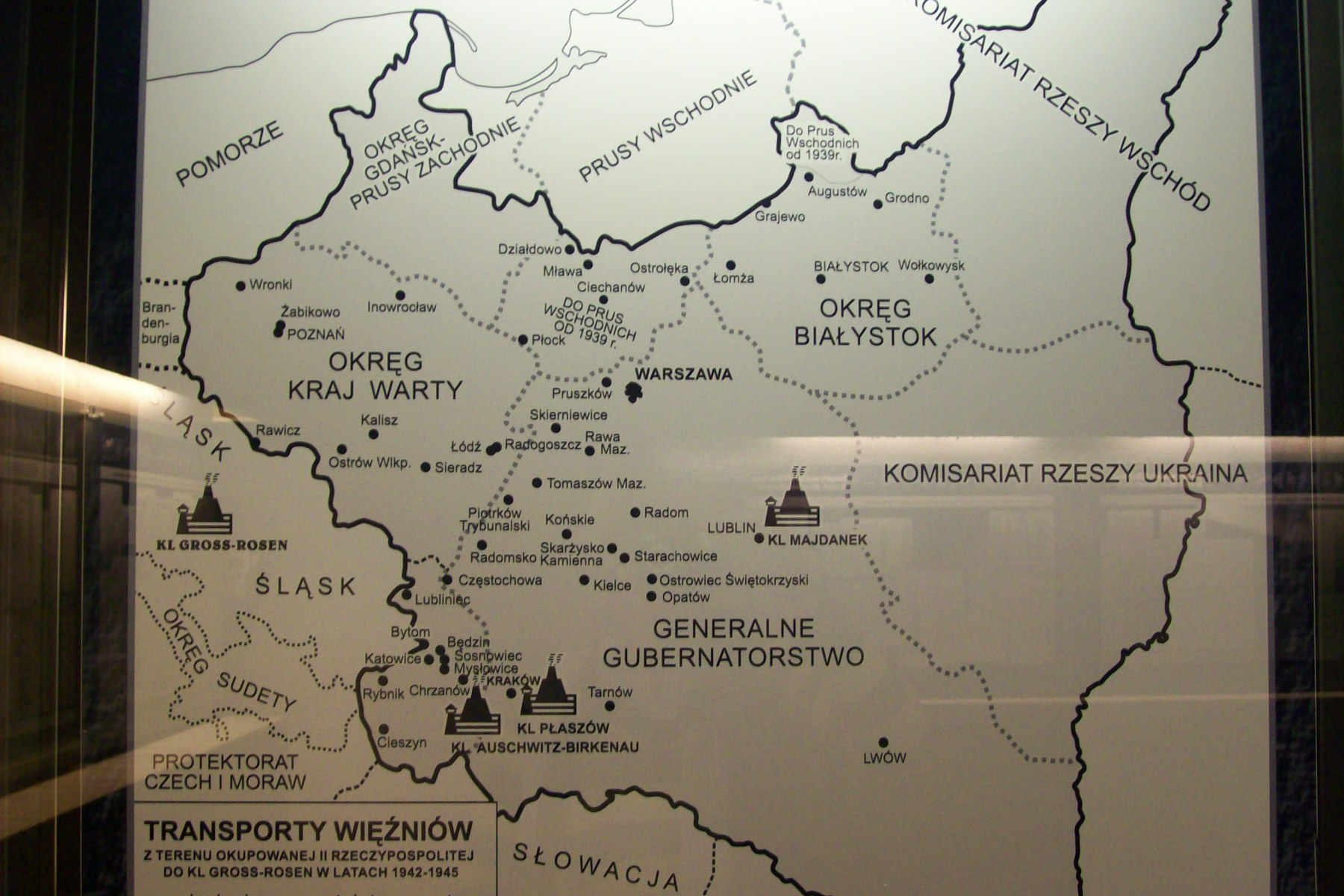 Informacje znajdujące się w muzeum KL Gross-Rosen w Rogoźnicy na Dolnym Śląsku